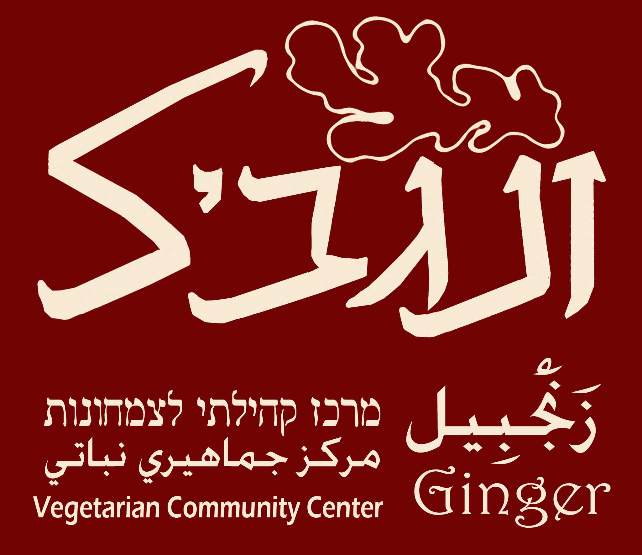 ginger logo